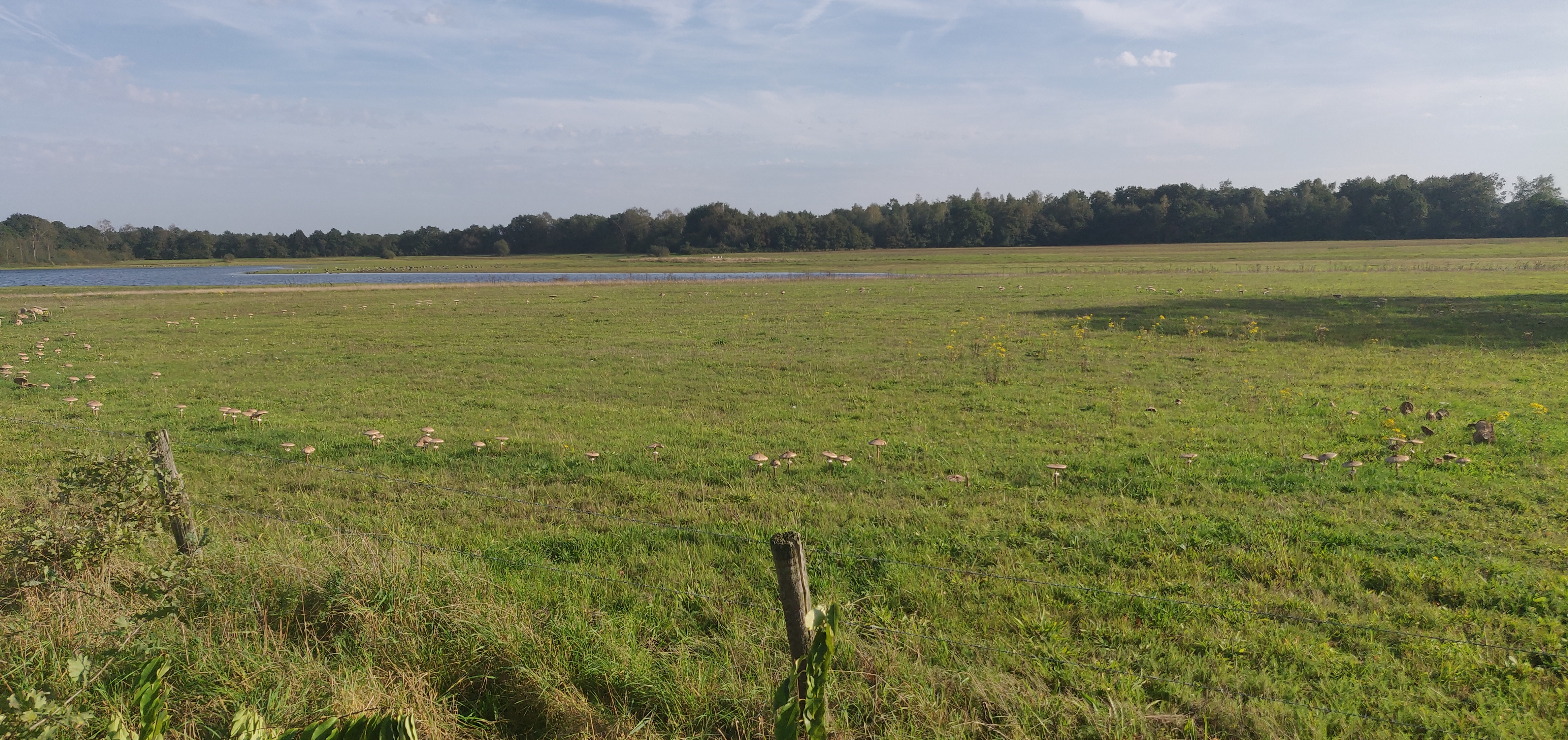 Heksenkring met een diameter van meer dan 20m bij het Beleven in Reusel (Nederland)